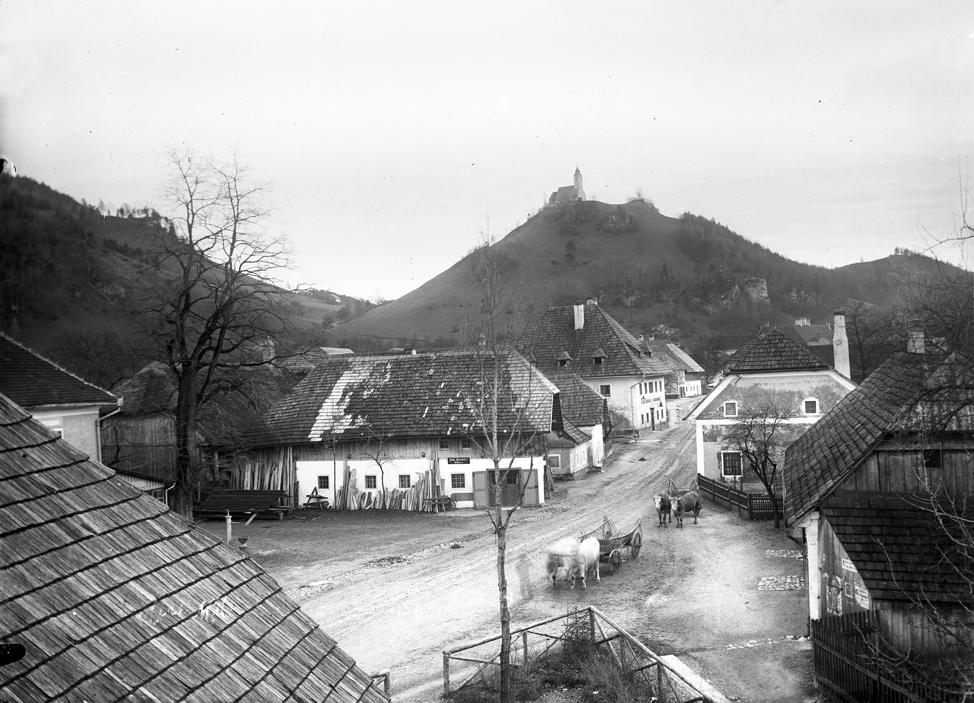 Ortszentrum von Micheldorf um 1900 mit der Kaisereiche in Bildmitte, im Hintergrund der Georgenberg.